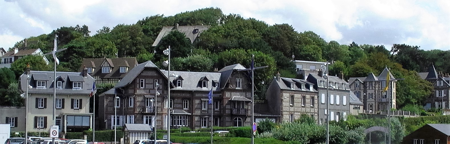 Panorama sur le coteau exposé au soleil l'après-midi.